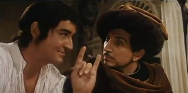 Screenshot del film Le piacevoli notti, regia di Armando Crispino e Luciano Lucignani (1966)